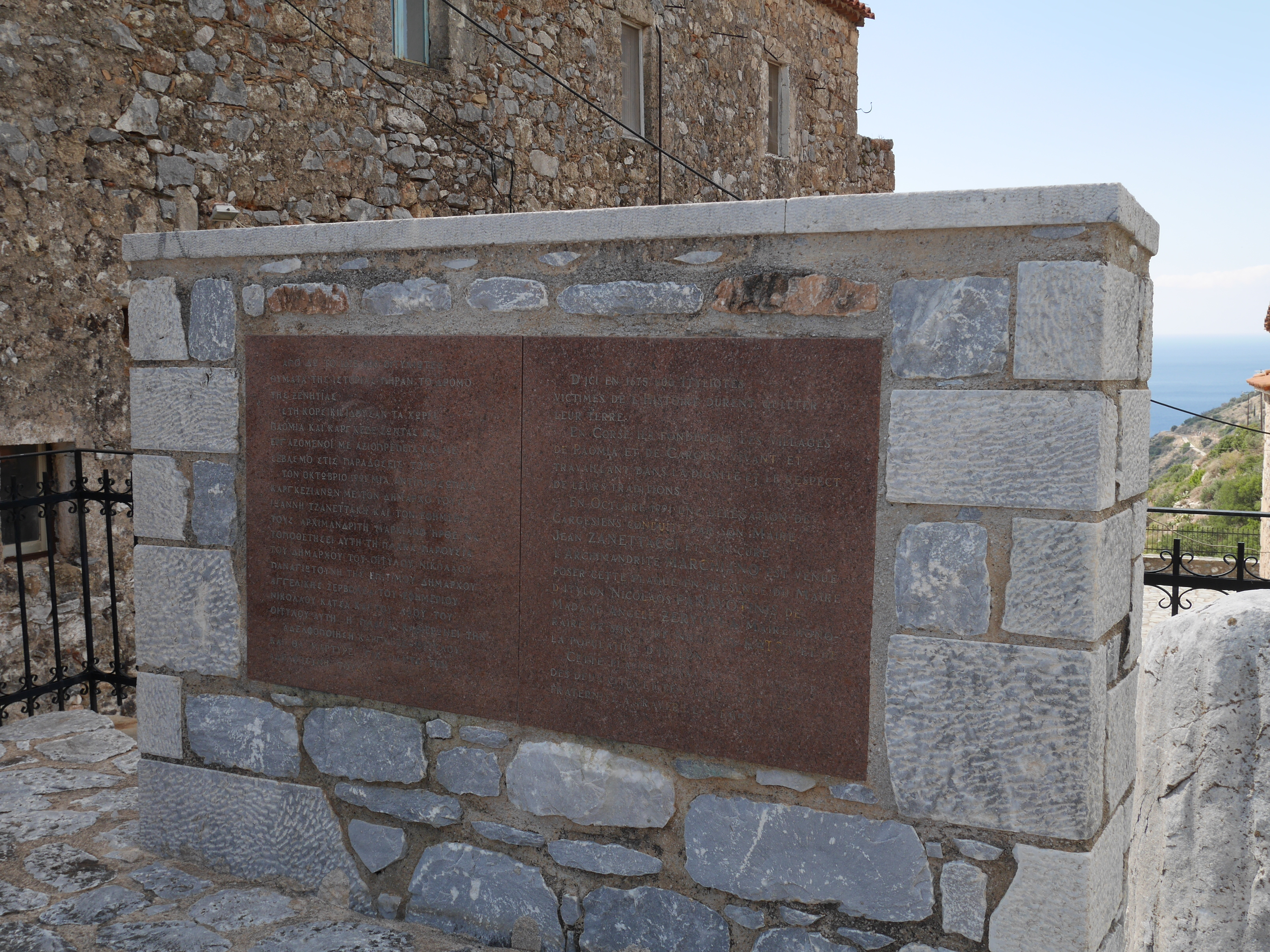 Plaque bilingue dans le village d'Itylo (Grèce) commémorant le départ en 1675 de la population pour la Corse où ils fondèrent les villages de Paomia et Cargèse.